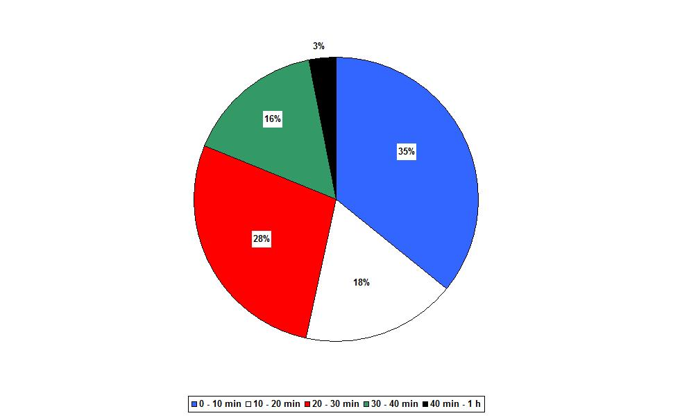 Durée du trajet domicile - travail des habitants de Delphos (Ohio - Etats-Unis) en 2009